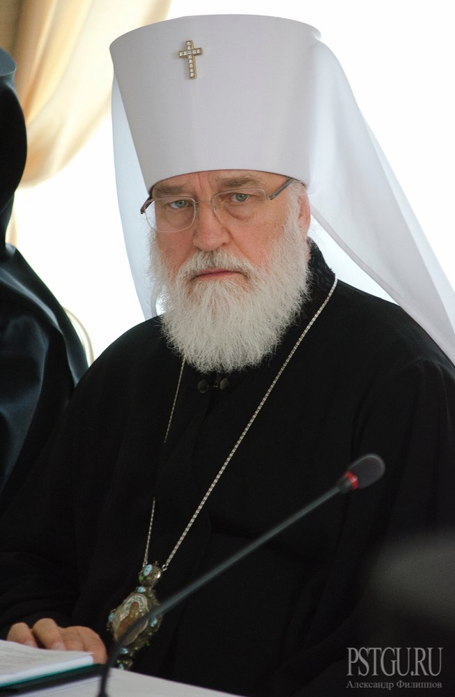 Научно-практическая конференция «Всеправославный собор мнения и ожидания»